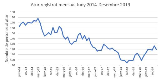 Atur registrat mensual juny 2014-desembre 2019